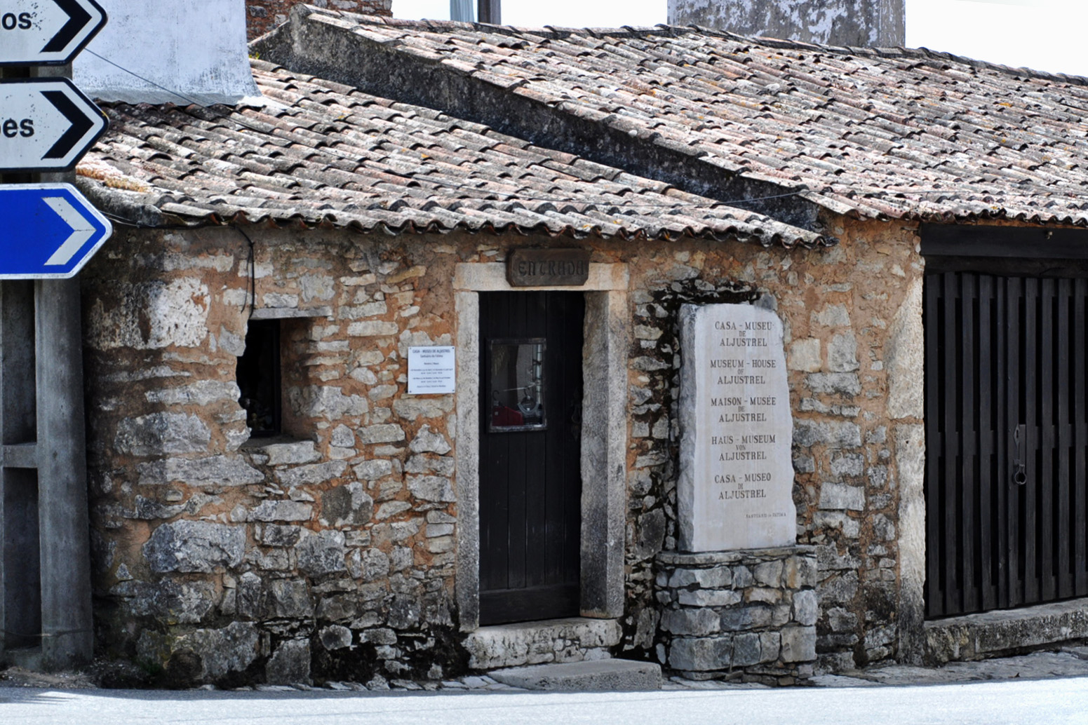 Fatima 0657